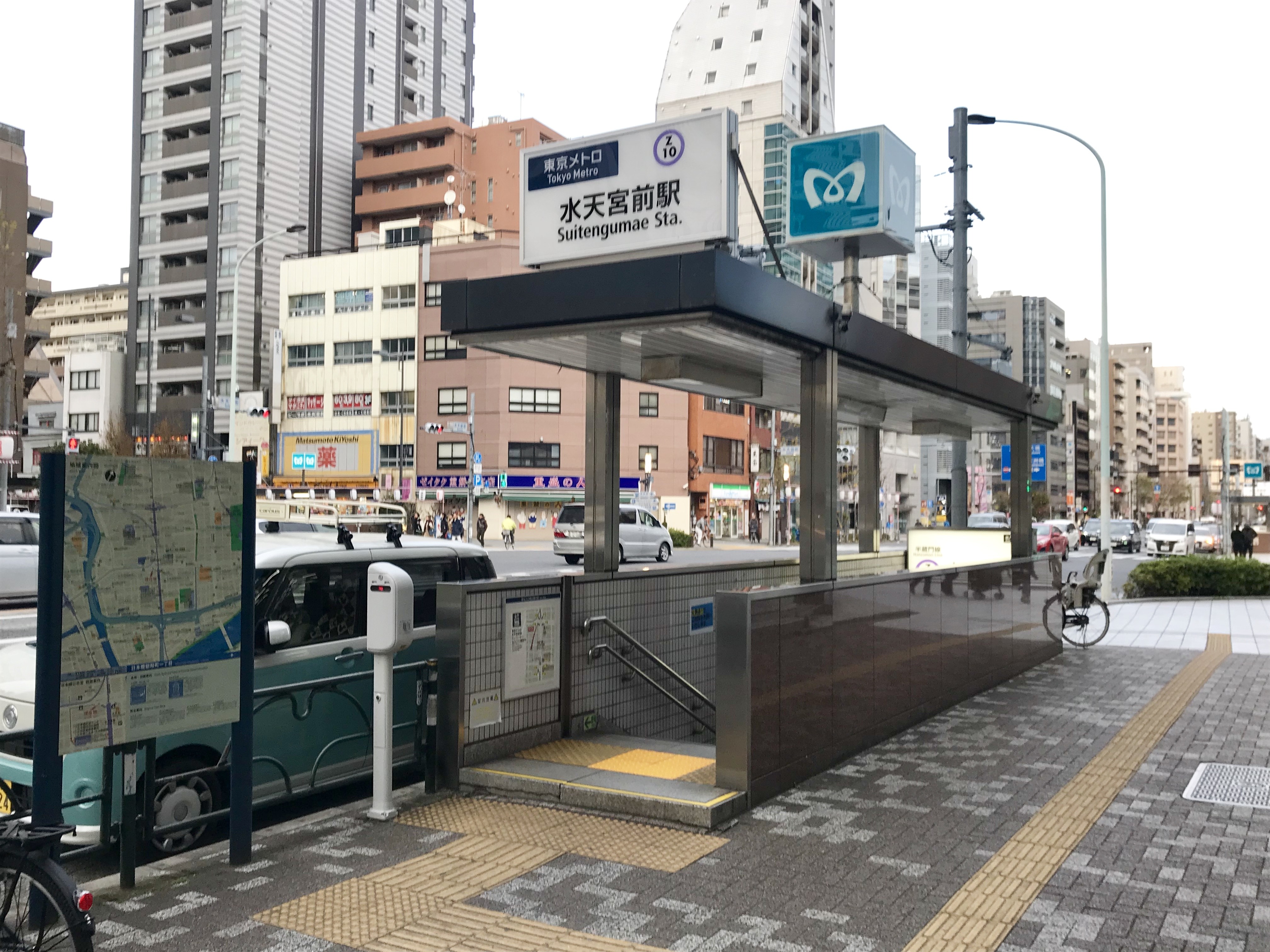 東京メトロ半蔵門線水天宮前駅6番出入口